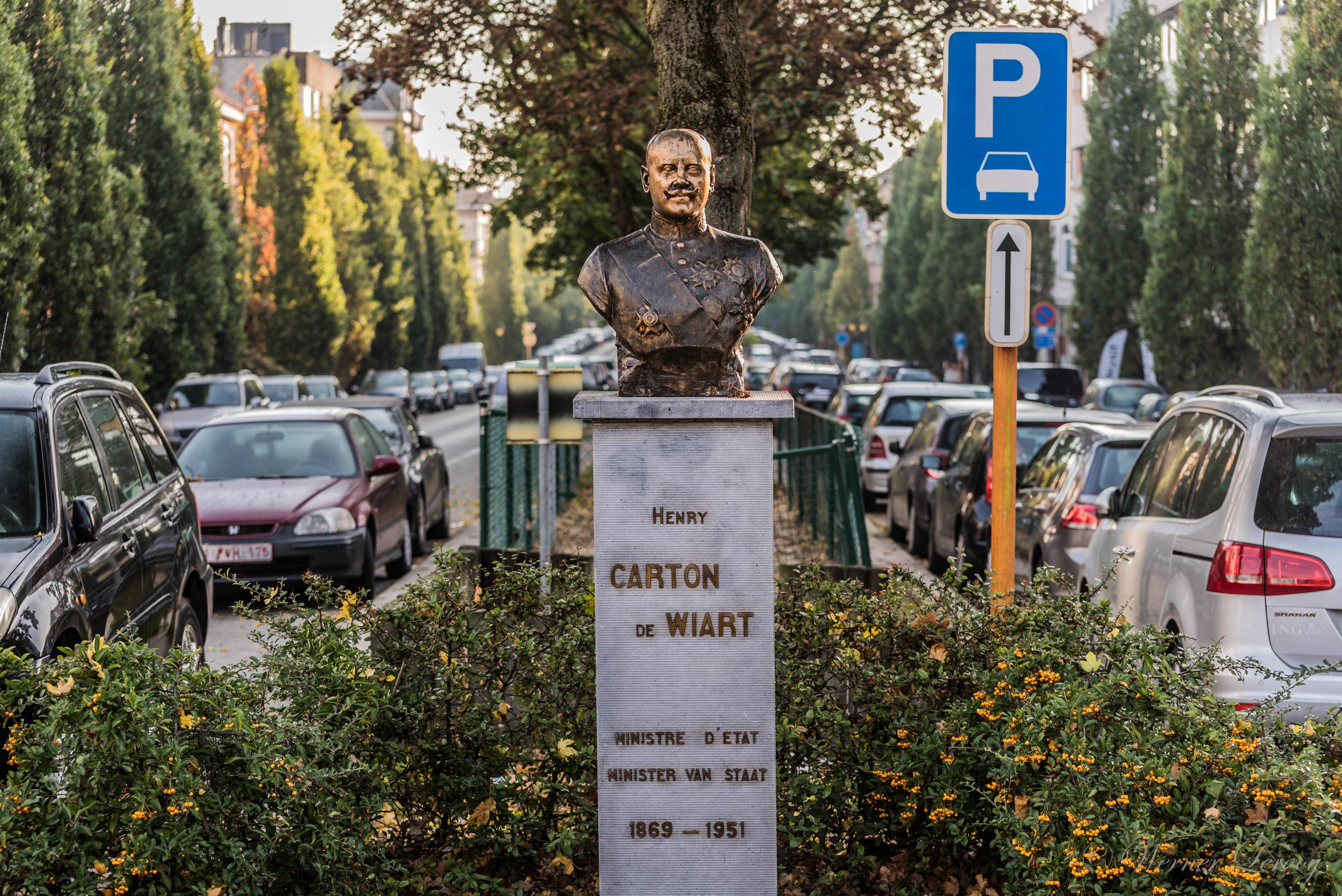 Standbeeld van Carton de Wiart in de naar hem genoemde laan in Jette